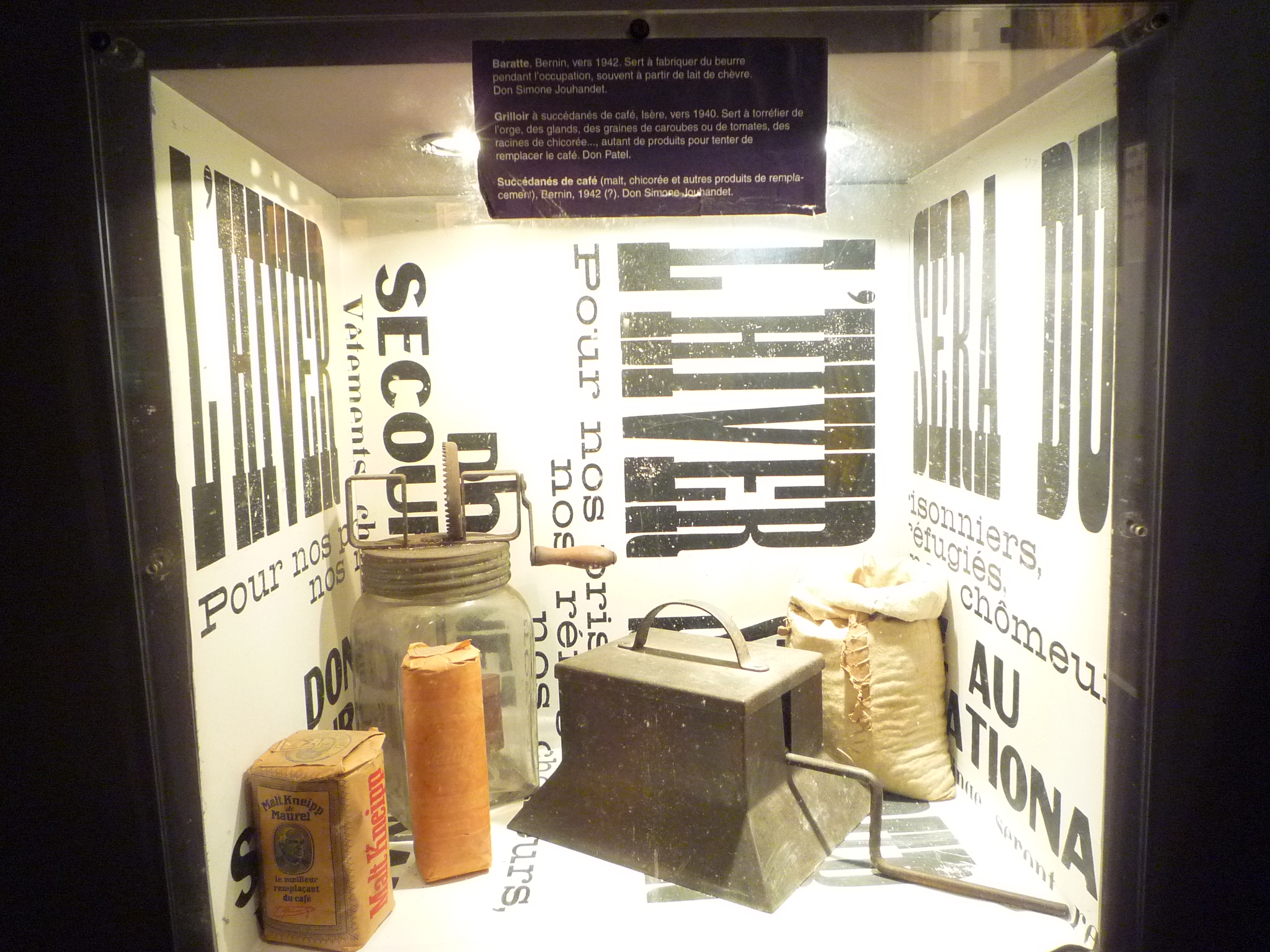 Musée de la Résistance et de la Déportation - Grenoble. Objets de la vie quotidienne.